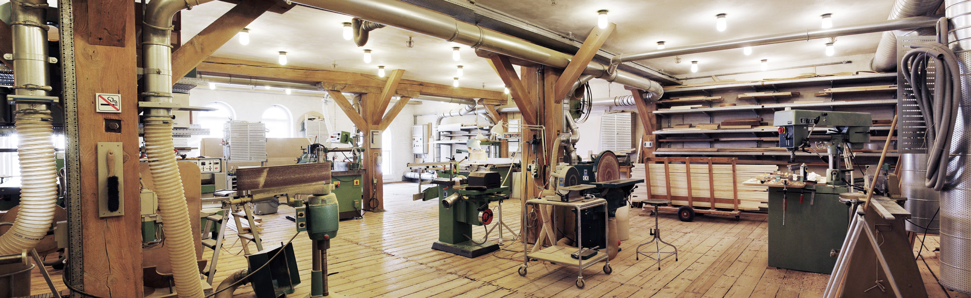 Træværkstedet på Statens Værksteder for Kunst, København